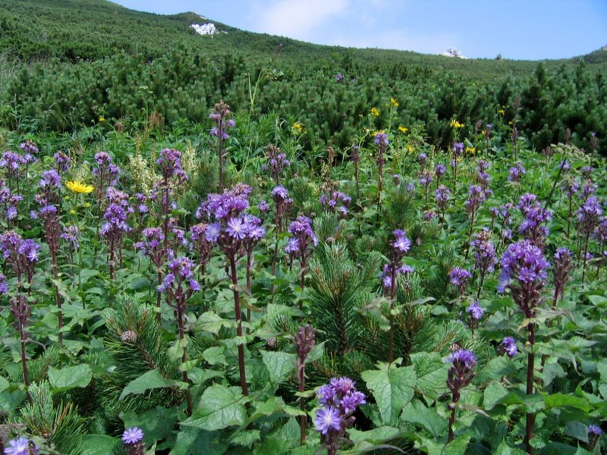 Navadna gorska ločika na Snežniku.